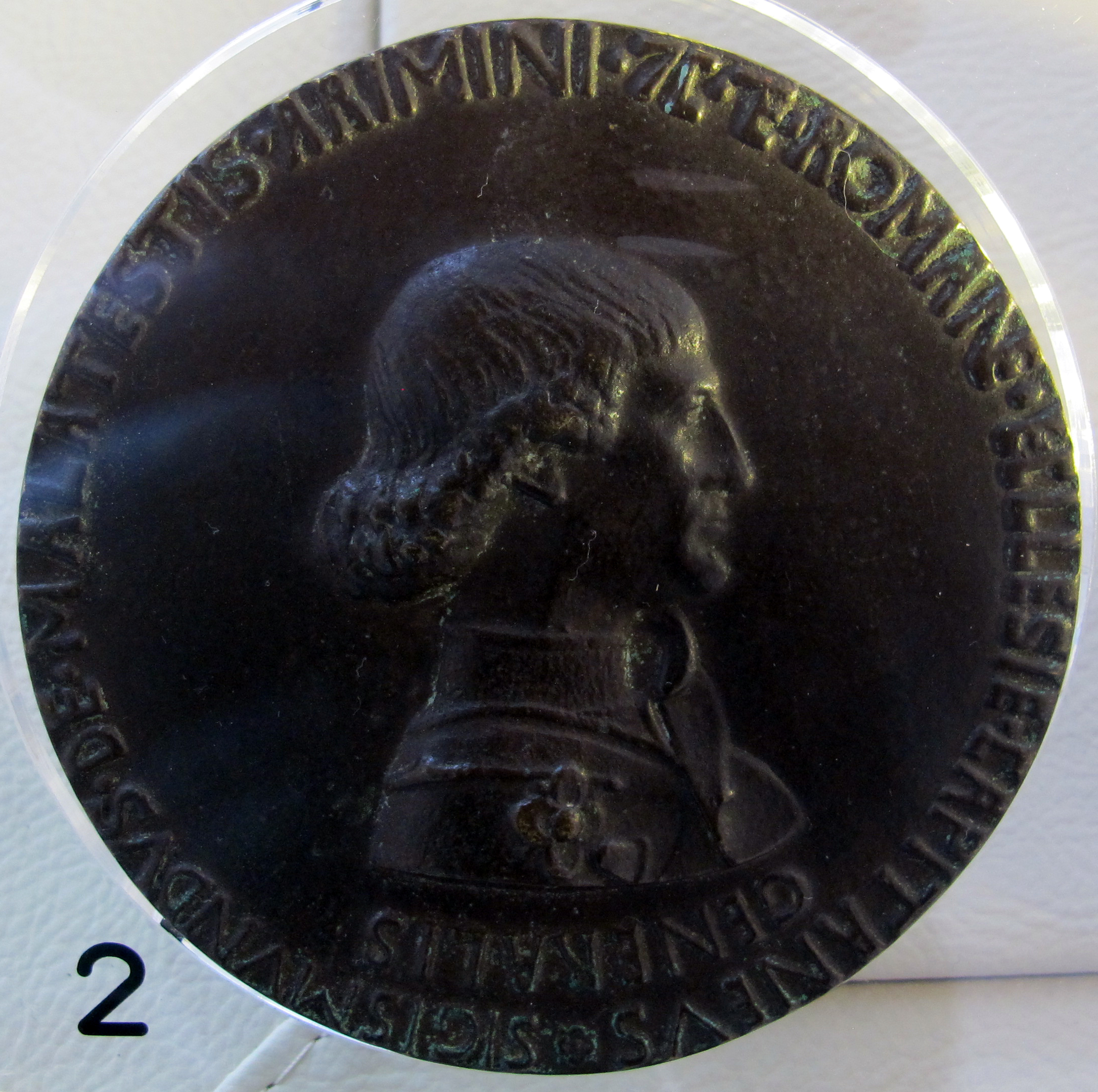 Da pisanello, medaglia per sigismondo p. malatesta